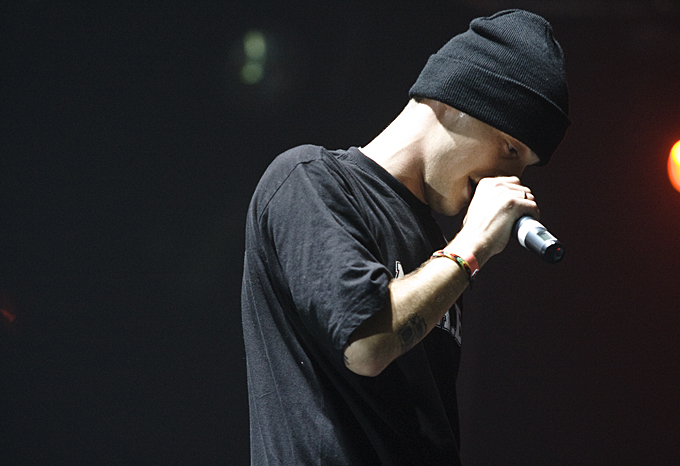 Концерт Гуфа, Смоки Мо и Басты в Ледовом дворце, 19 сентября 2009 год